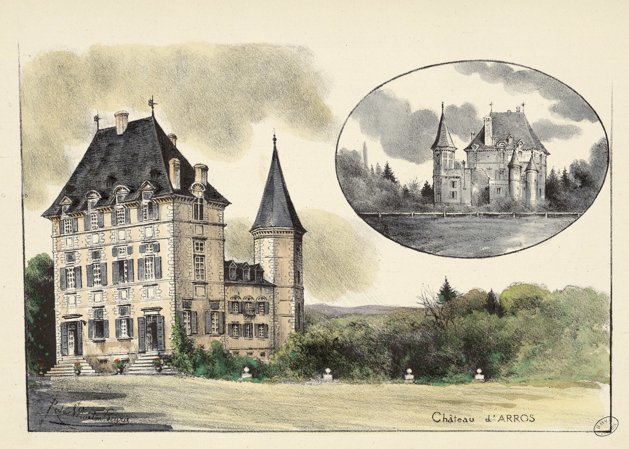 Ancely, René (1876 - 1966). Possesseur